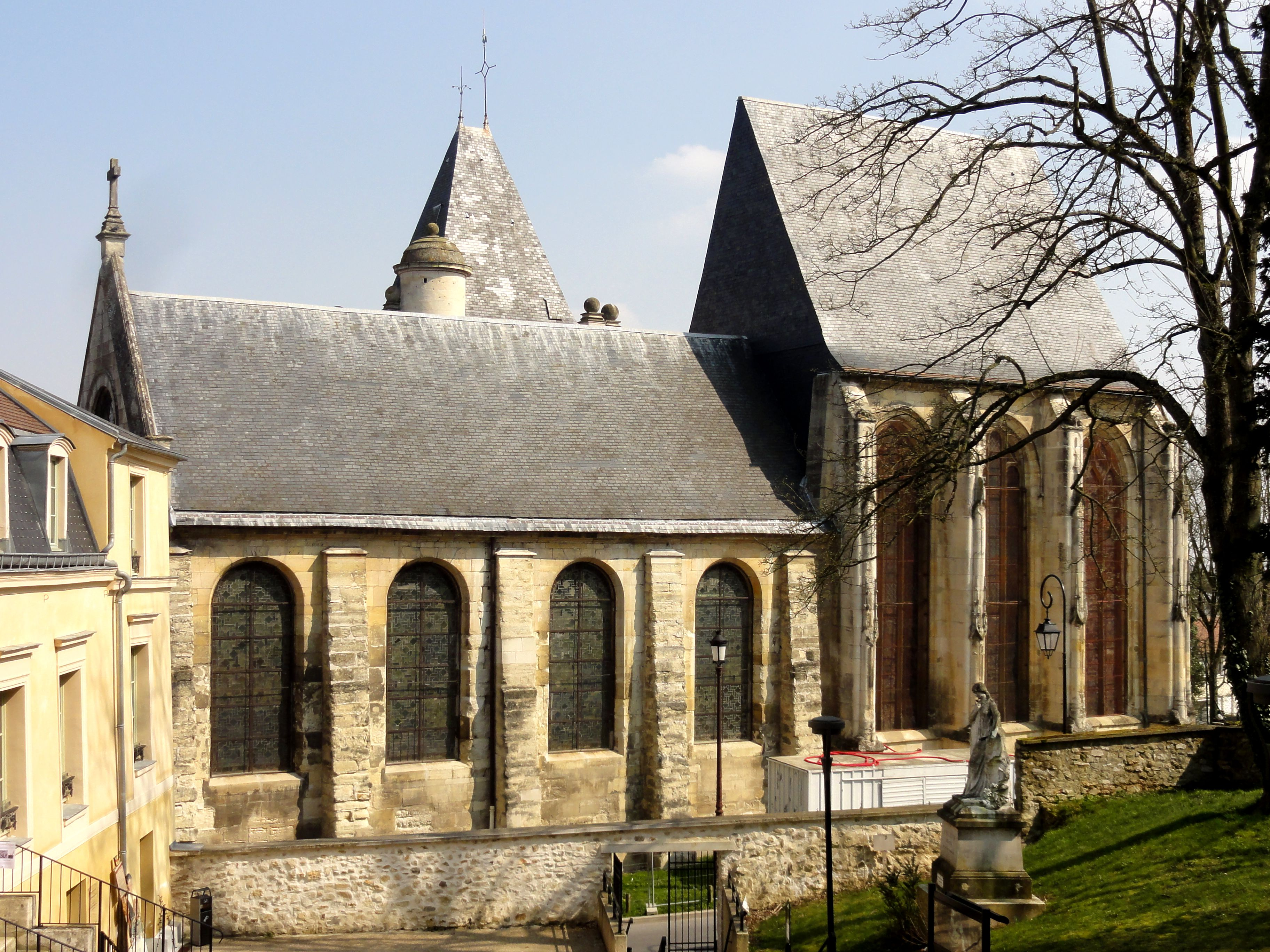 Vue depuis le sud (jardin du manoir des Tourelles).